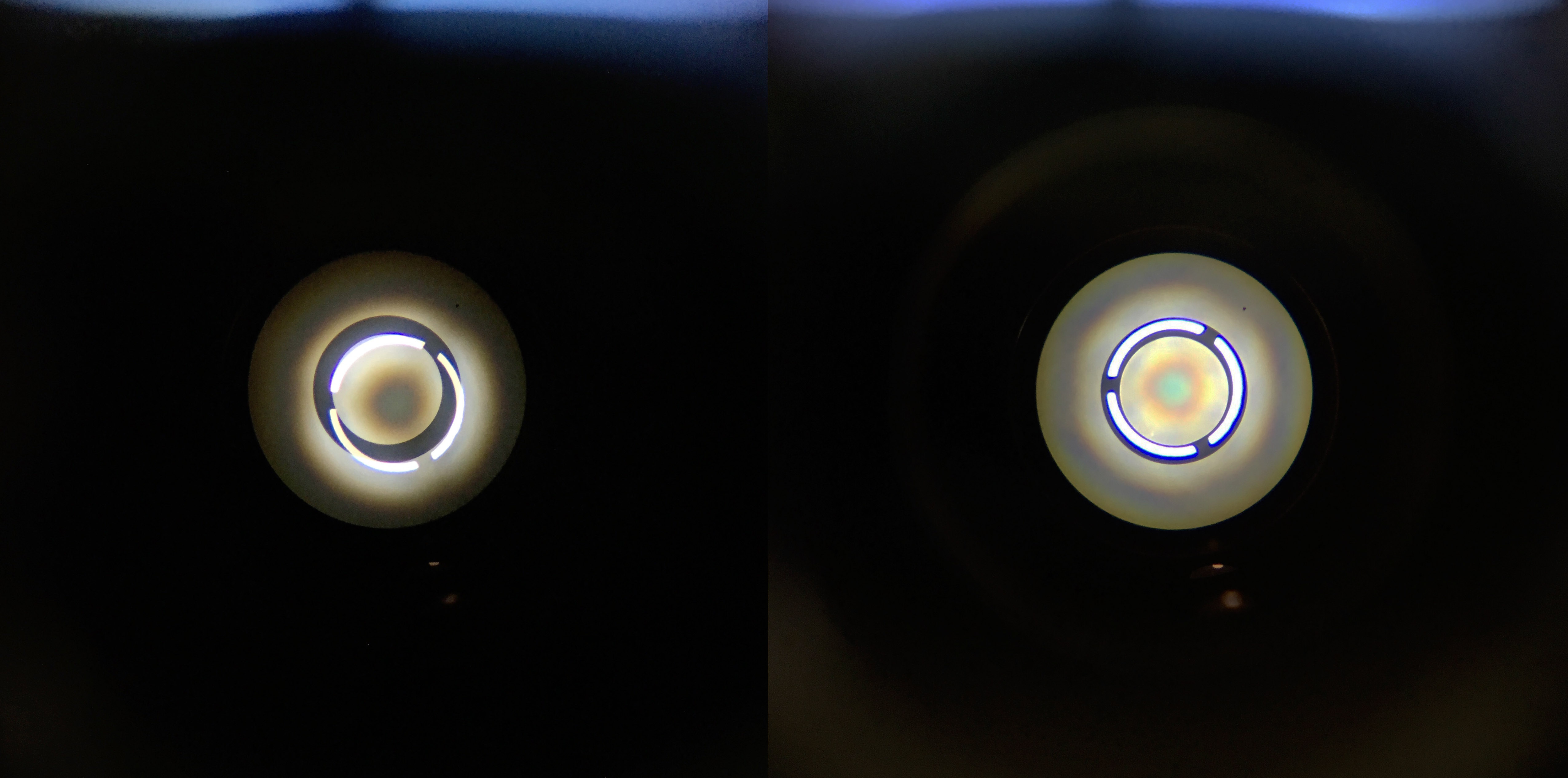 Phase telescope in action